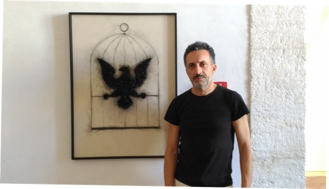 Vito Bongiorno, an Italian painter from Alcamo (Sicily)